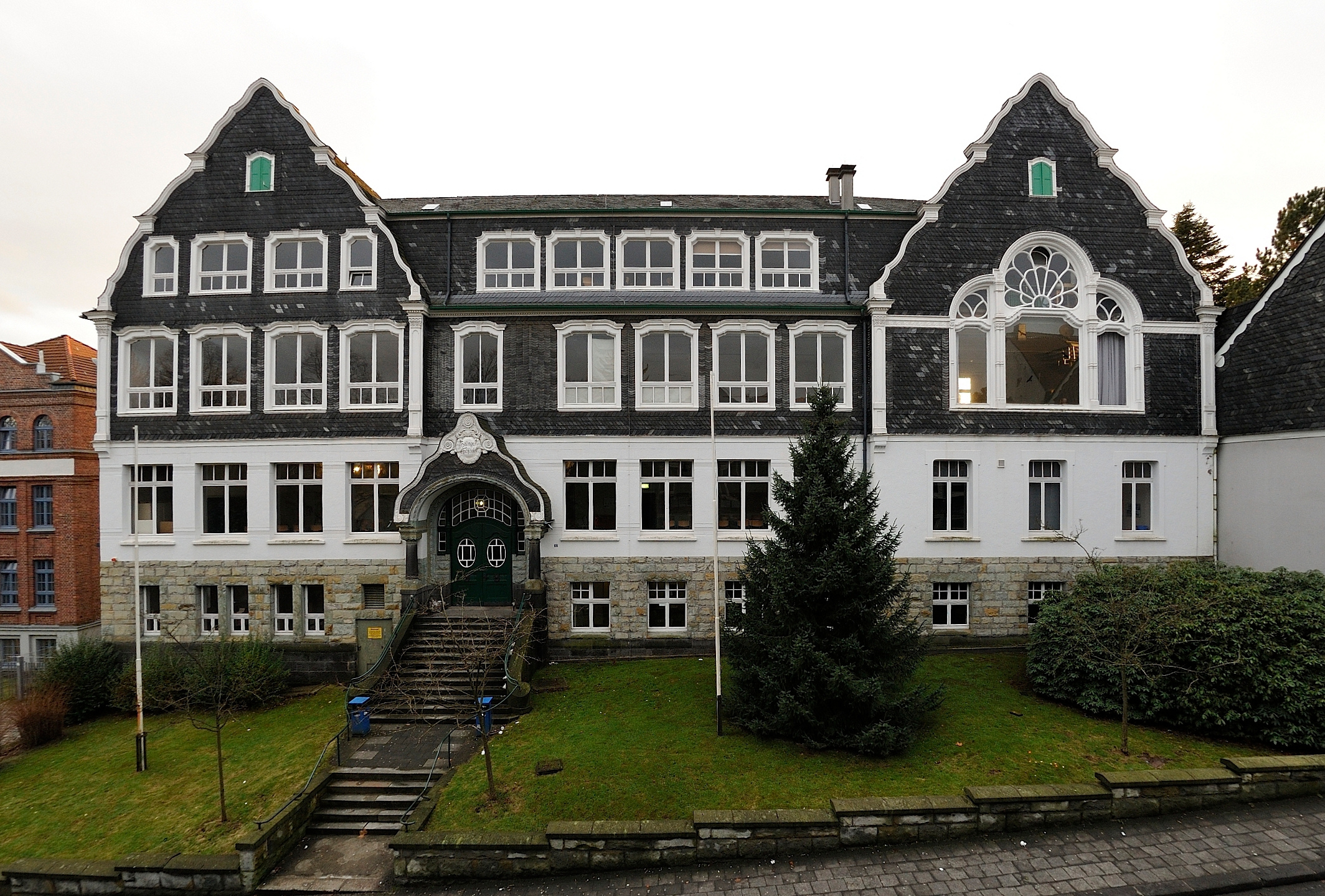 Solingen Blumenstraße 91-93